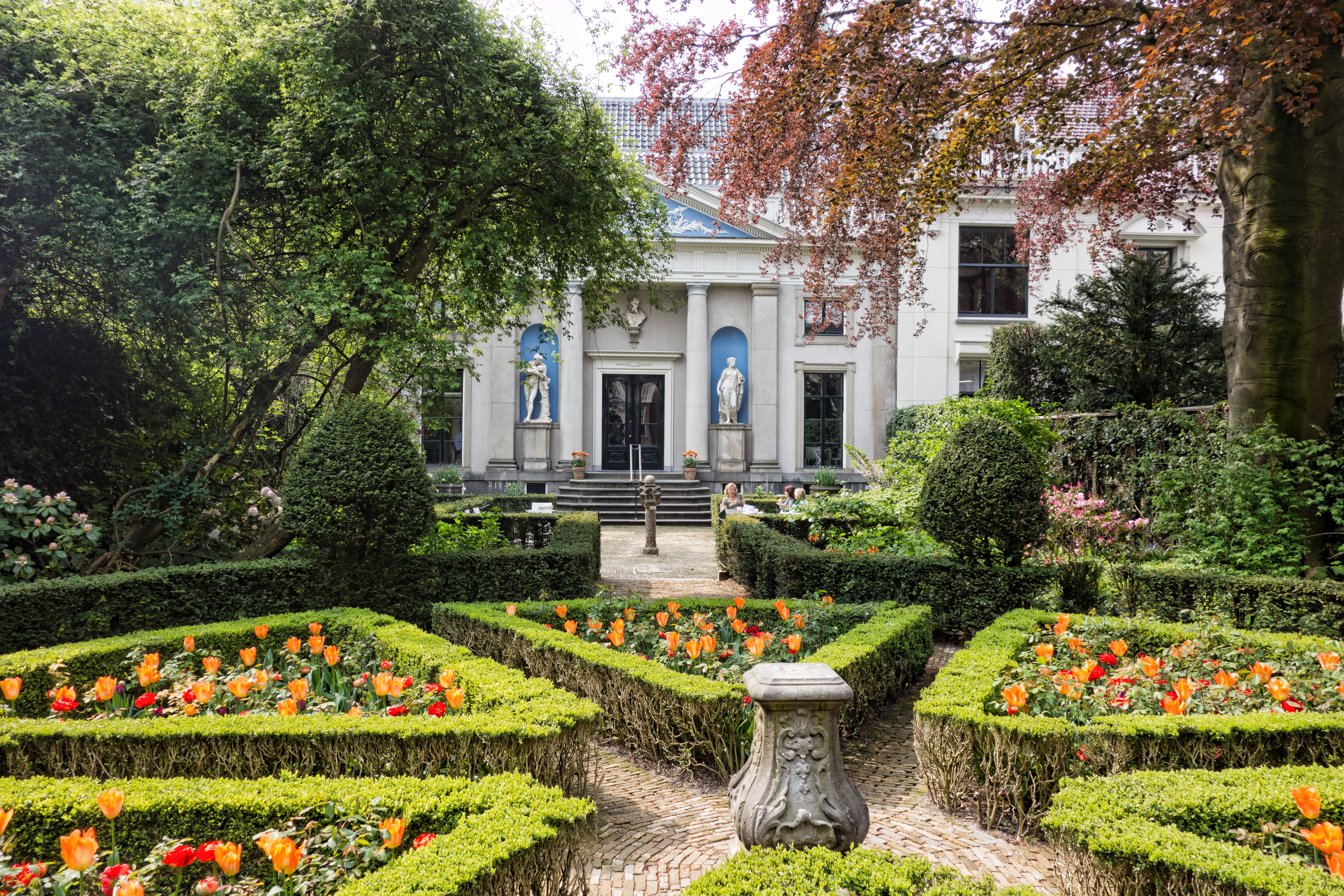 Jardins du Museum Van Loon, Amsterdam